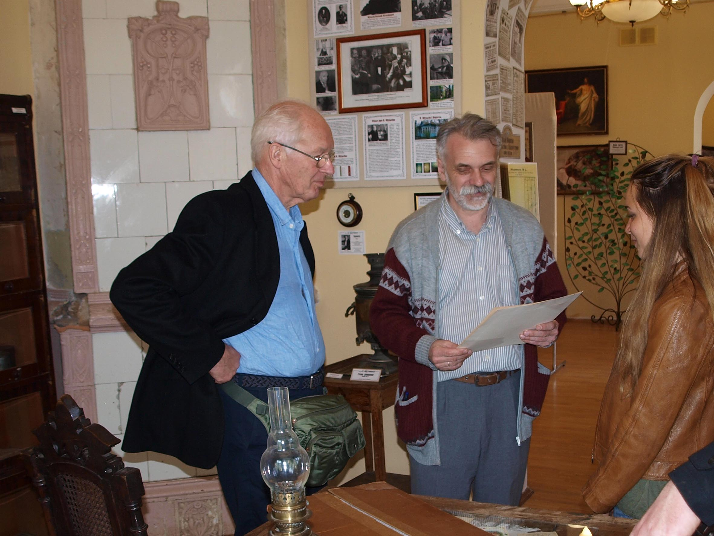 Нащадок Н.Уварової Ігор Уваров (ліворуч) і директор Олександр Соколенко. Музей «Уваровський дім».